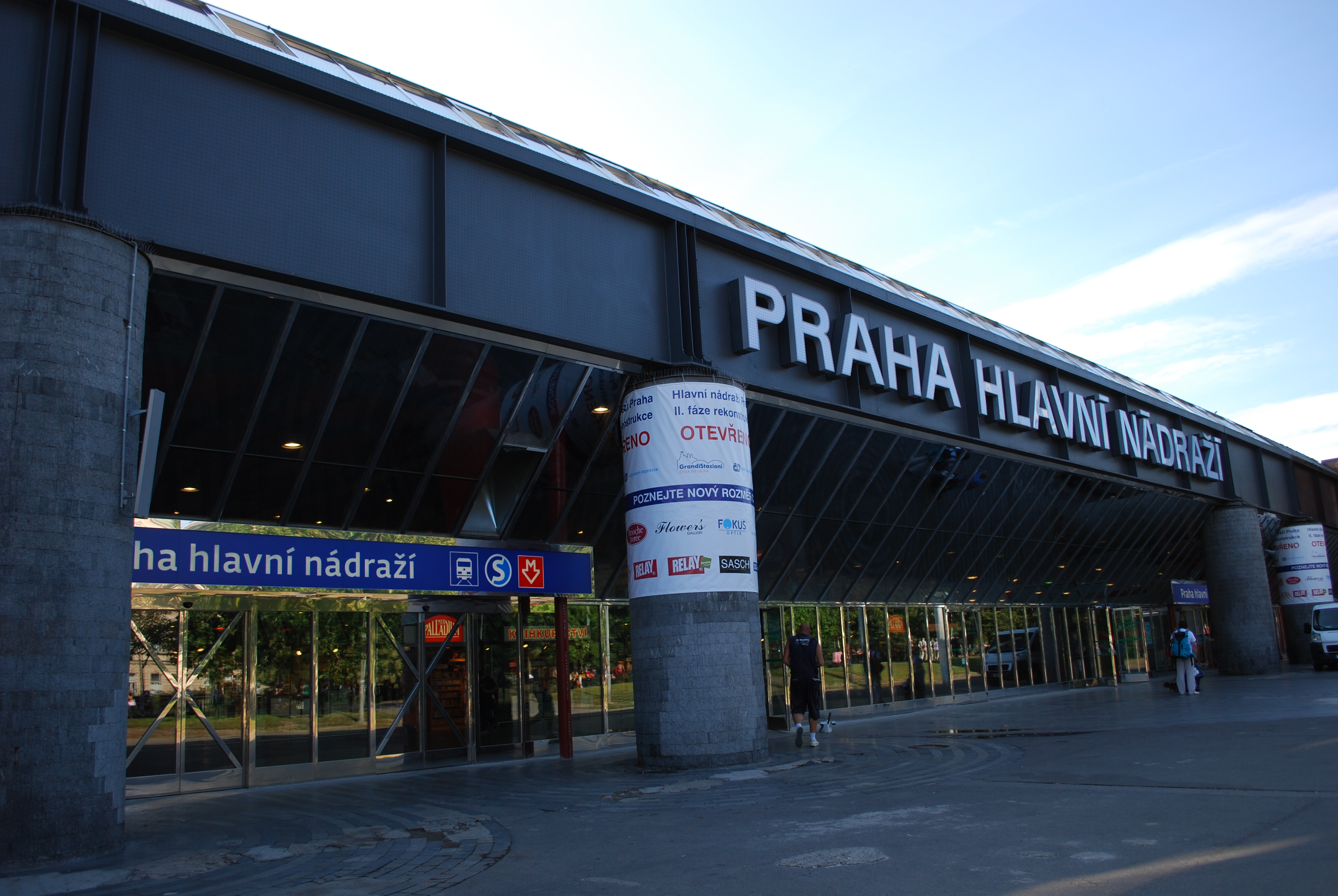 Praha Hauptbahnhof 2009